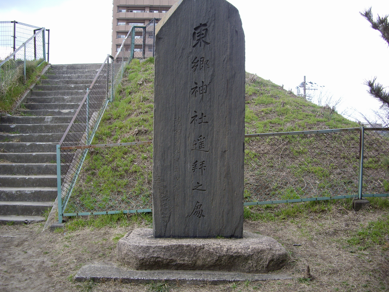 金鉢山公園にある東郷神社遙拝場の碑。